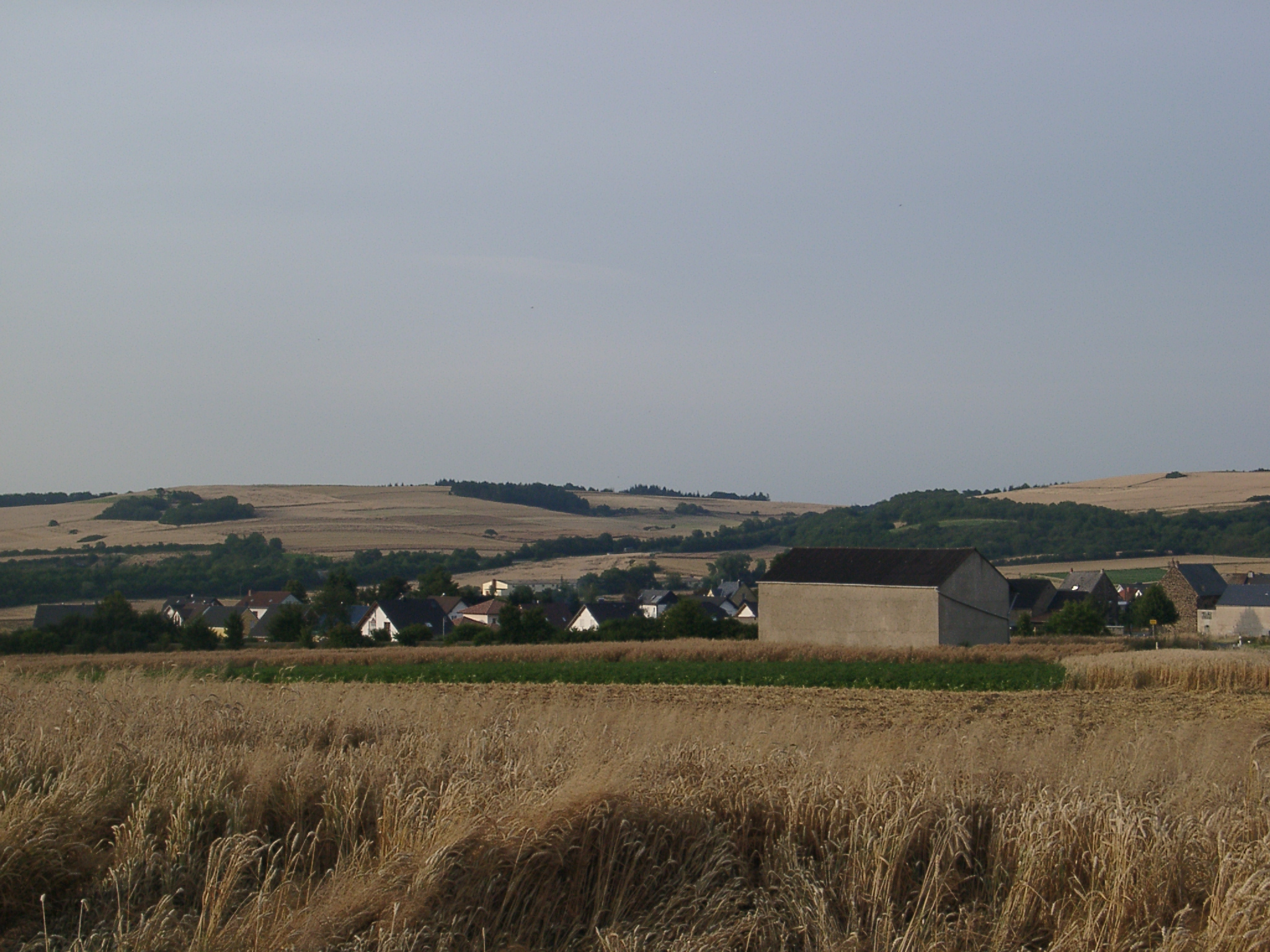 Kerben, Kreis Mayen-Koblenz - selbst fotografiert (Klaus Graf) 23.7.2005